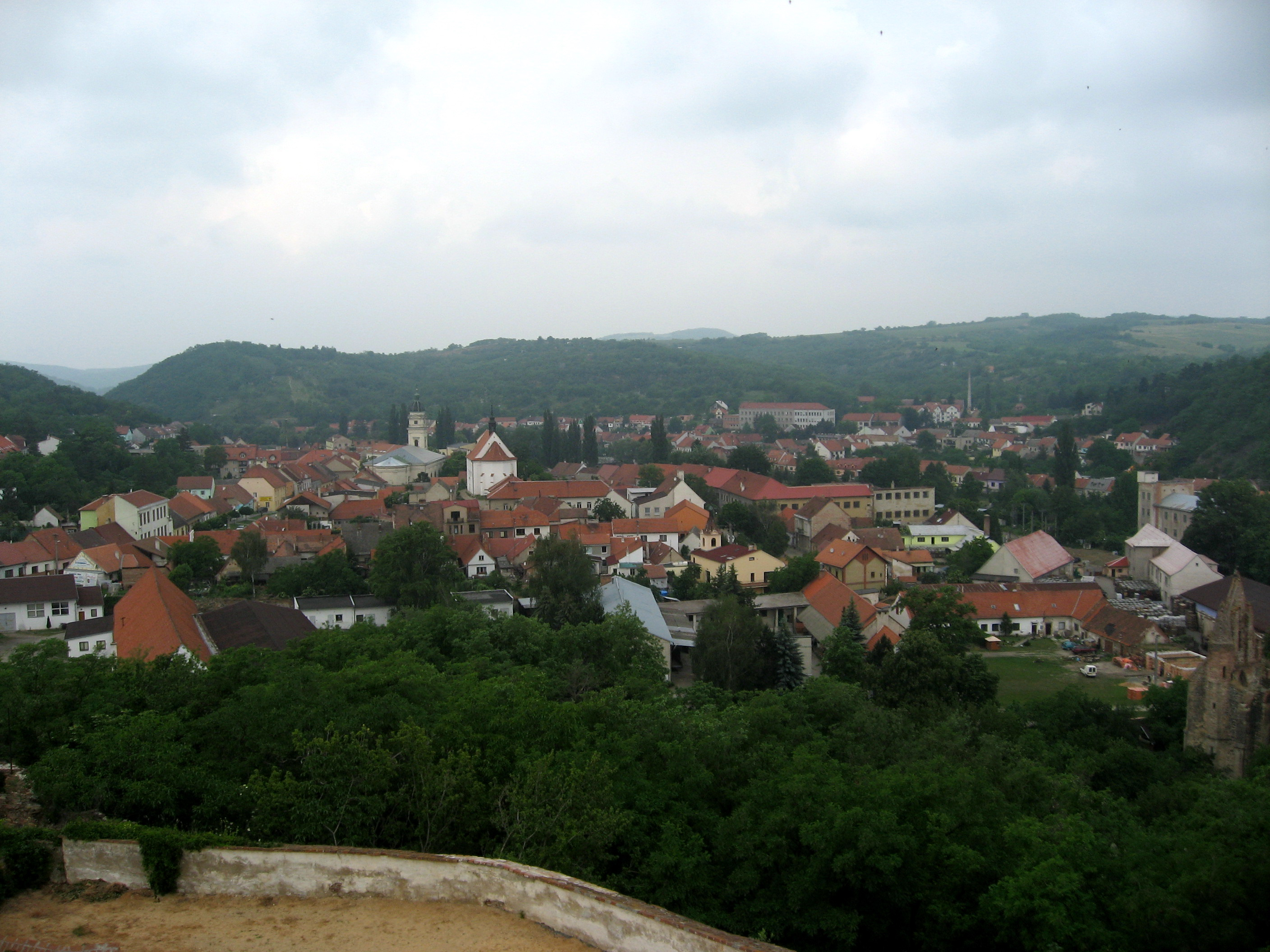 Dolní Kounice